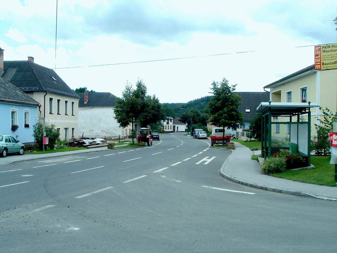 Goberling, Burgenland, Austria